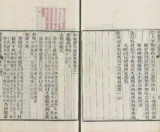 《御批歷代通鑑輯覽》（Yupi Lidai tongjian jilan）卷一